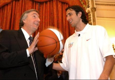 Emanuel Ginobili con Nestor Kirchner.